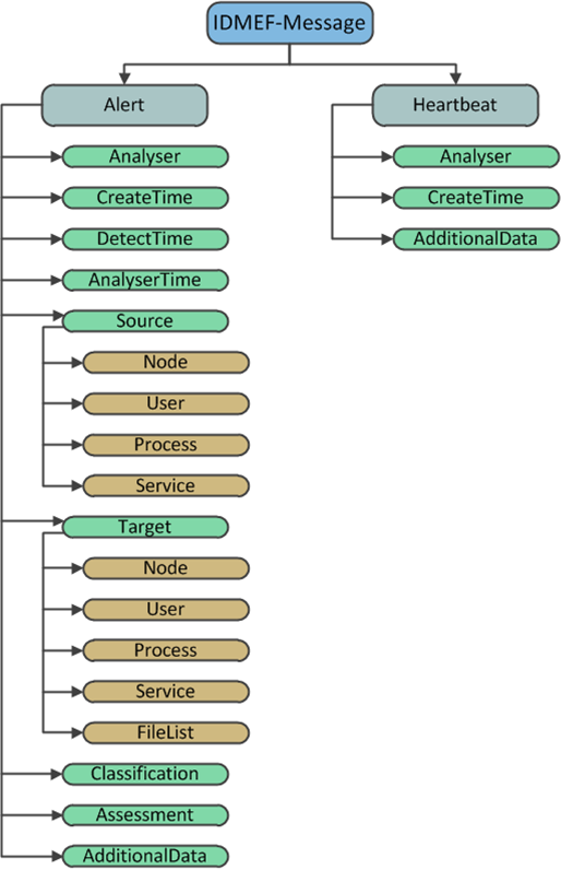 Schéma du format IDMEF